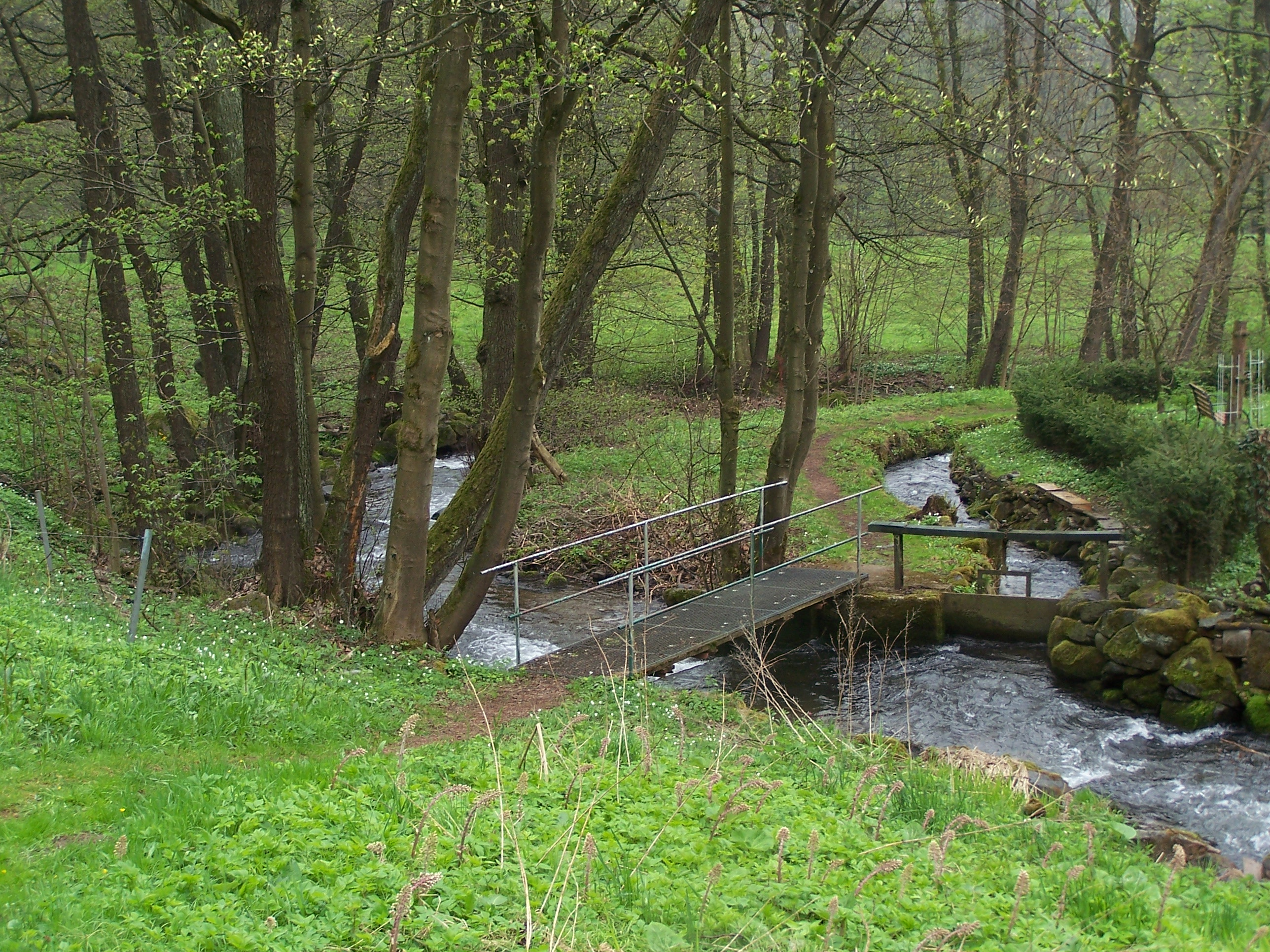 Standort: Brotterode-Trusetal. In der Laudenbach 1 Wehr an der TRUSE mit dem Wasserfallgraben und zugehörig. Wanderweg zum Trusetaler Wasserfall